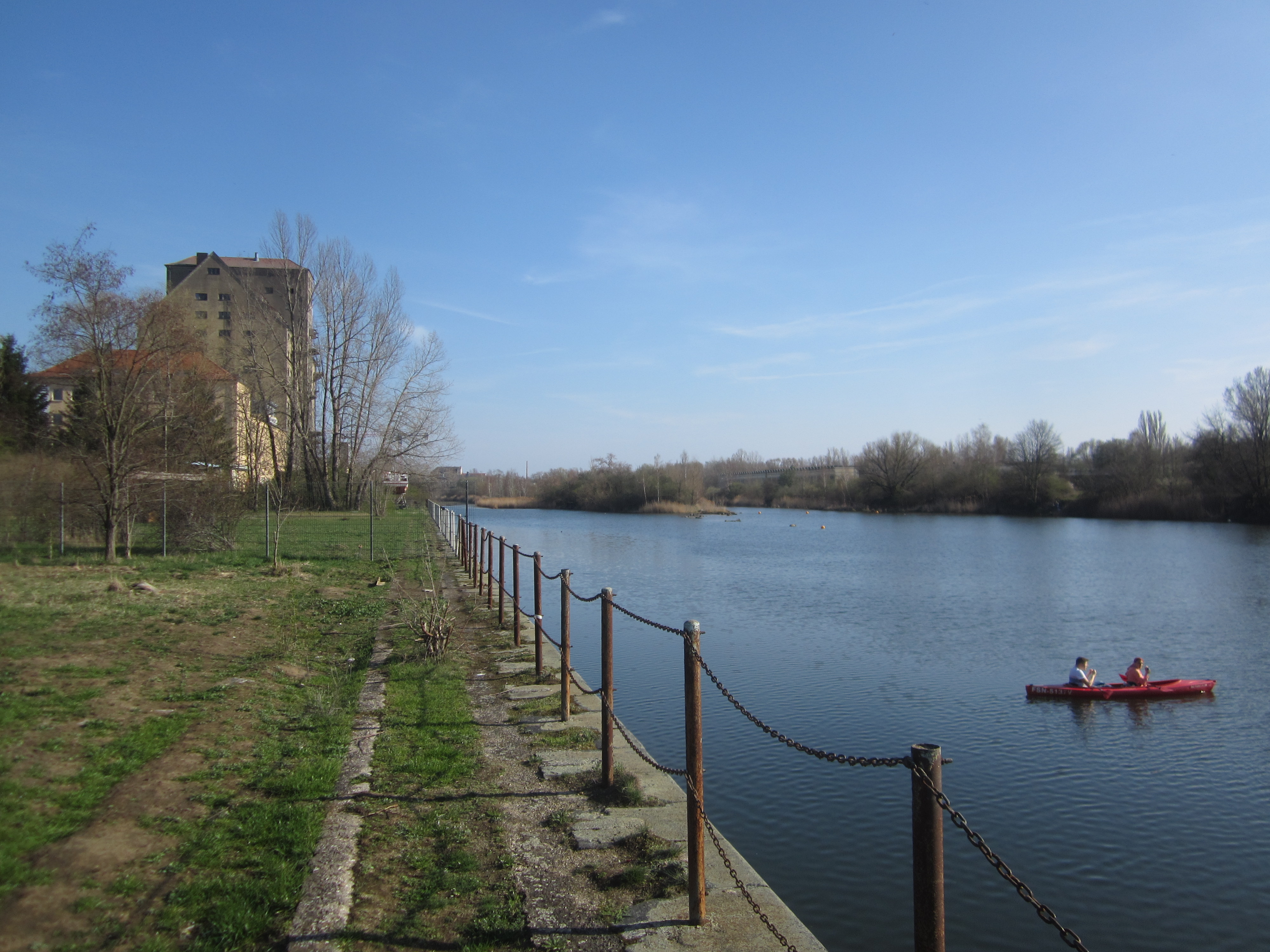 Speicher und Kaimauer am Lindenauer/Leipziger Hafen